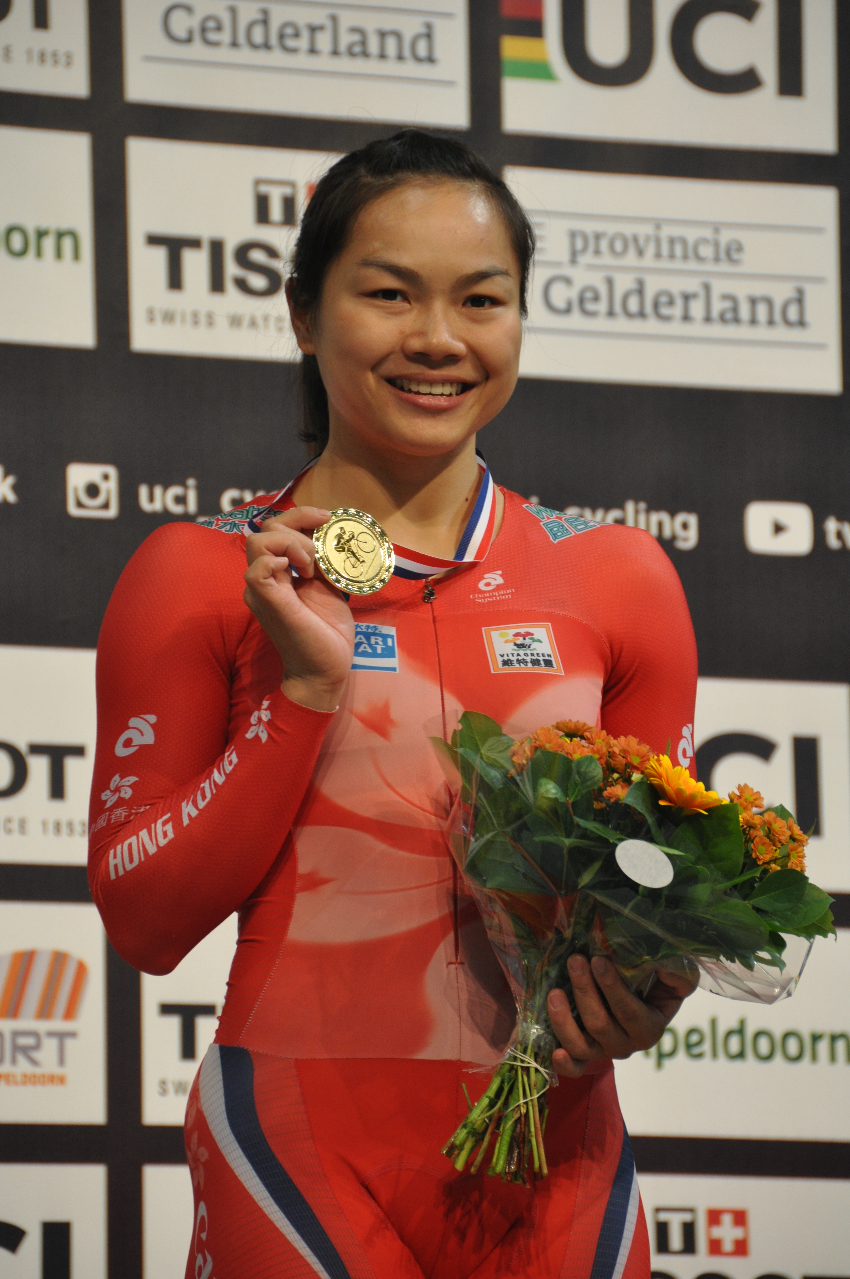 Lee Wai-sze, Radsportlerin aus Hongkong, Gold im Sprint